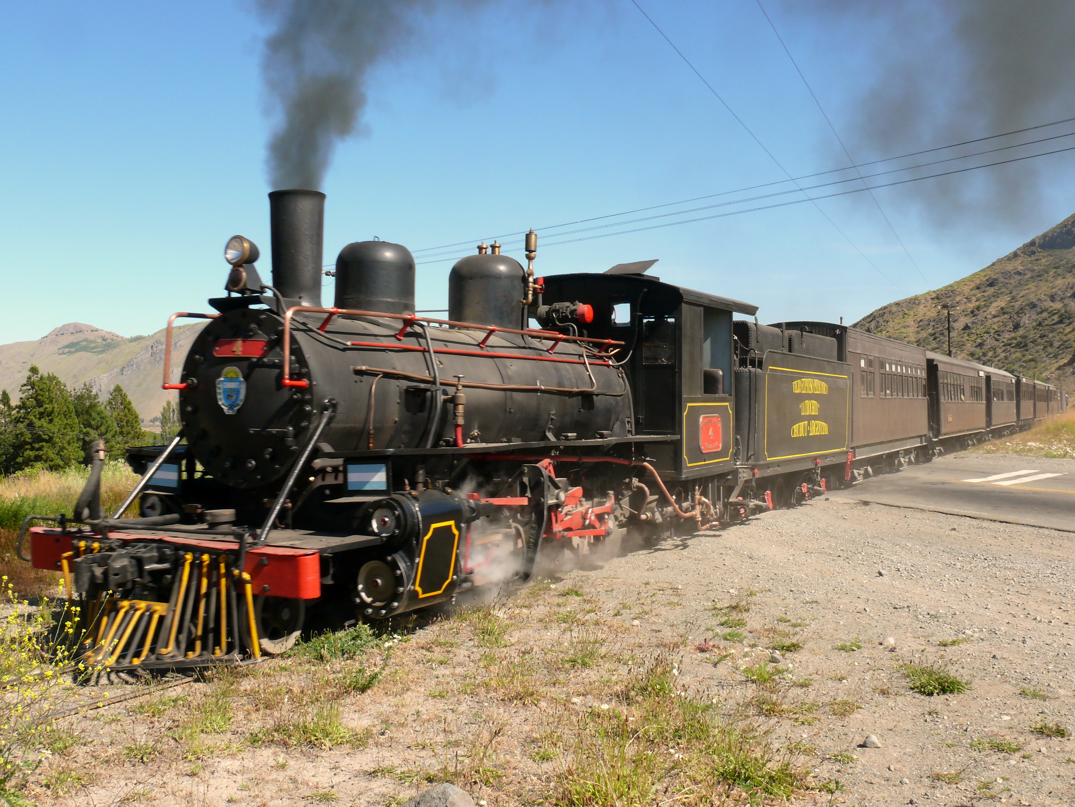 La Trochita cruzando Ruta Nacional 259